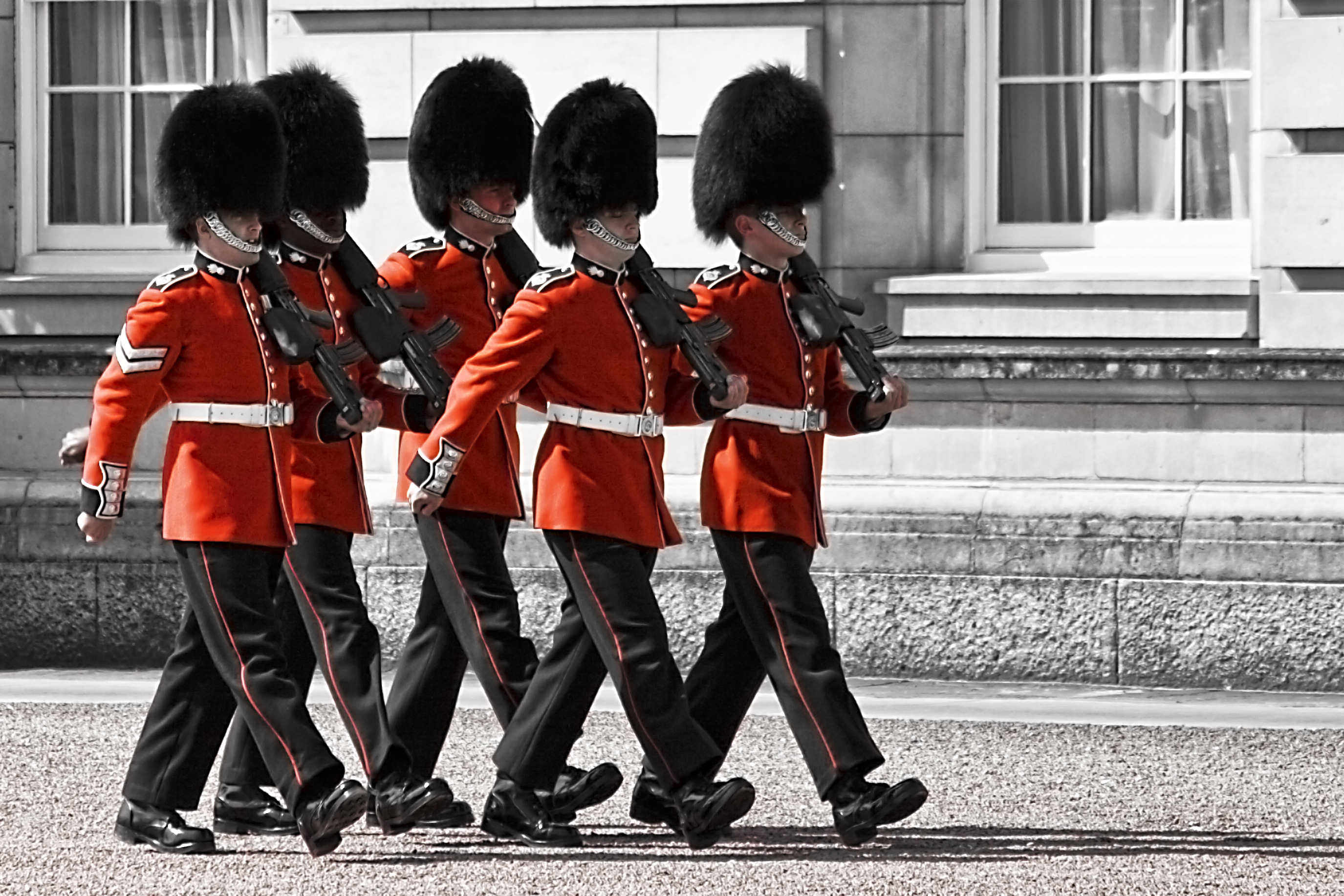 El famoso cambio de guardia en el Palacio de Buckingham. Se puede ver en: .au/2010/11/18/crowns-courtships-c...